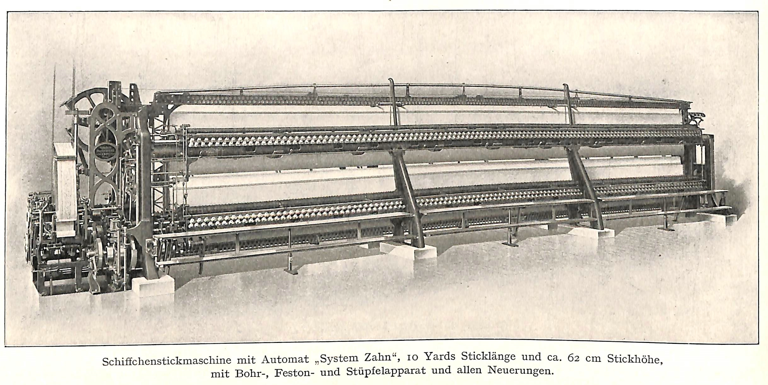 Plauen - Ansicht einer Stickmaschine aus dem Fertigungsprogramm der Vogtl. Maschinenfabrik AG, vormals J.C. & H. Dietrich